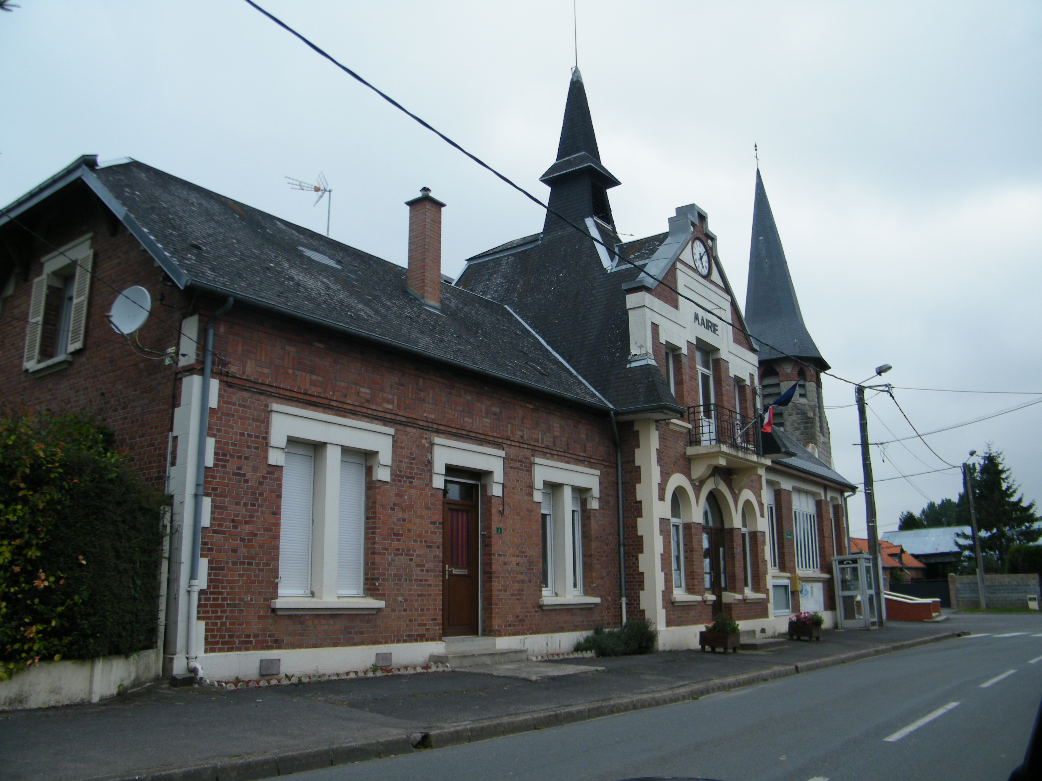 Mairie-école de Feuillères, Somme, France.